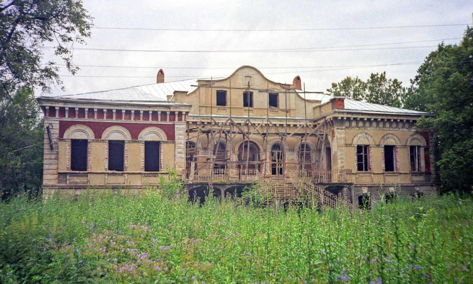 Усадьба "Красное", Подольский район, Московская область